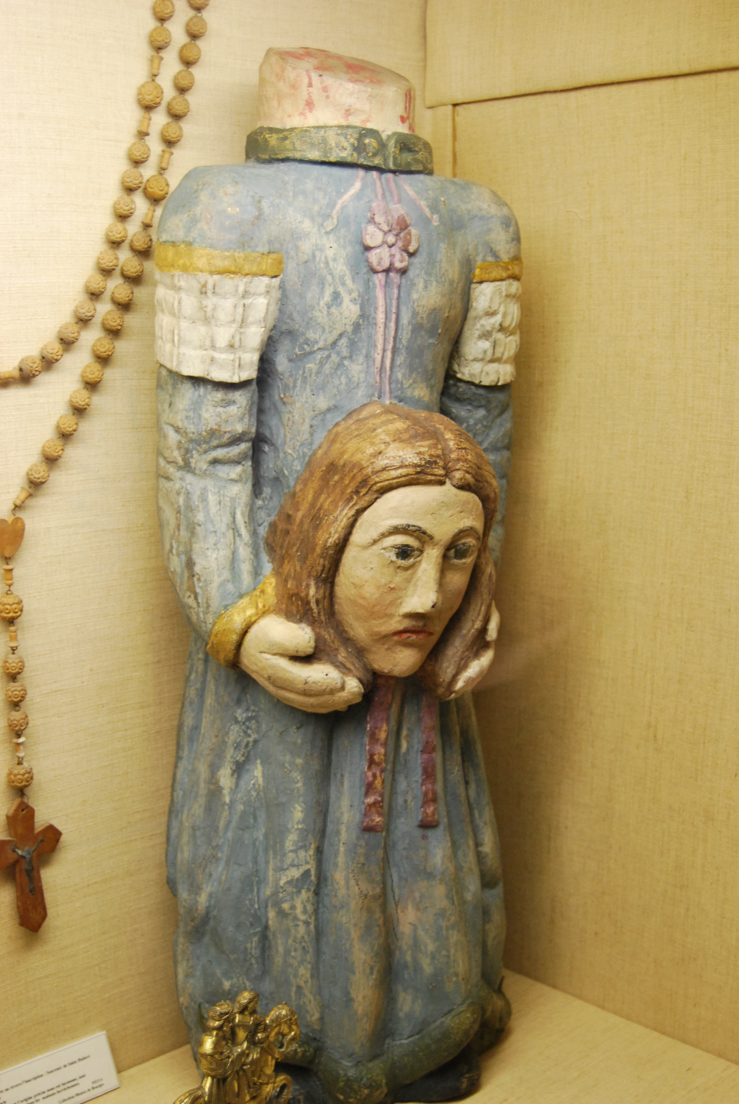 Statue représentant Sainte Solange, sainte patronne du Berry. Elle est exposée au Musée du Berry à Bourges (Cher)